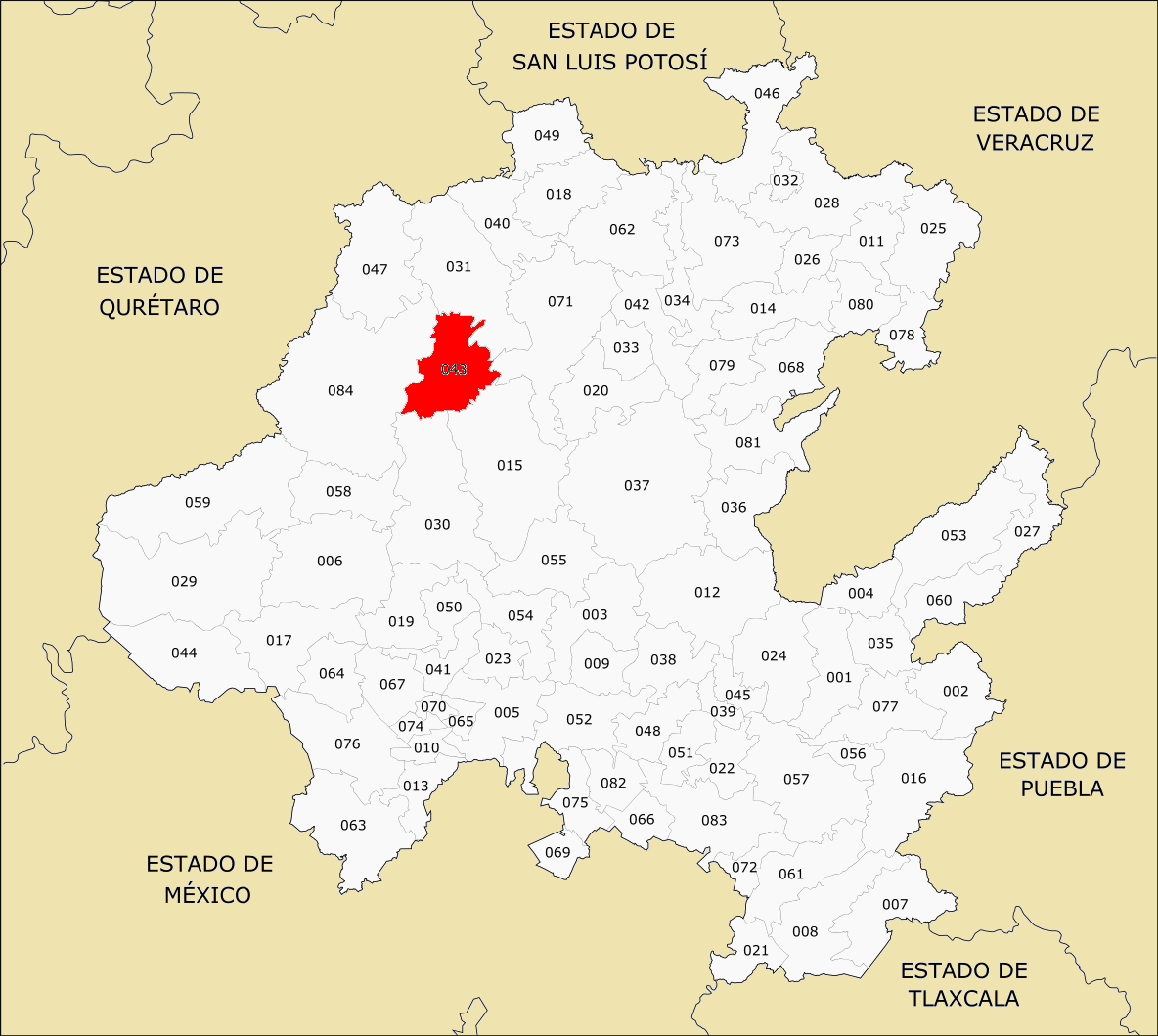 Municipio de Hidalgo